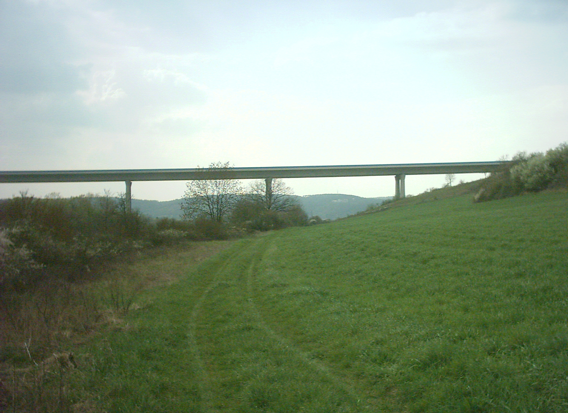 Beschreibung: Autobahnbrücke der A71 bei Münnerstadt Fotograf: presse03, 2005, selbst erstellt Lizenz: GNU-FDL Kategorie:Bild:Brücke